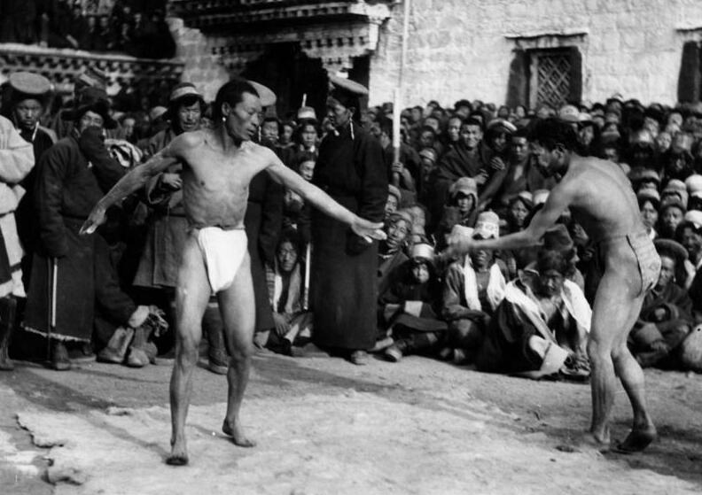 Lhasa, Ringkampf